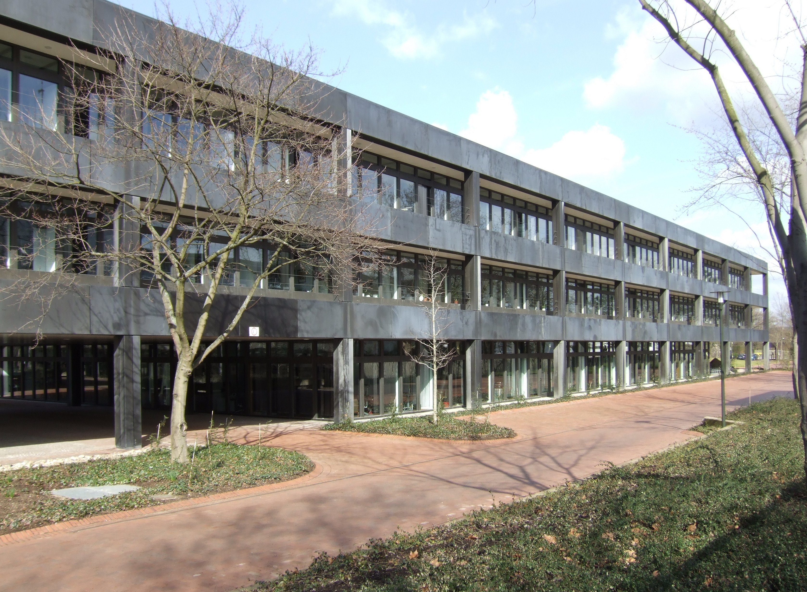 Auf dem Bild sieht man das Bundesministerium für wirtschaftliche Zusammenarbeit und Entwicklung (ehemaliges Bundeskanzleramt) in Bonn (Dahlmannstraße 4).